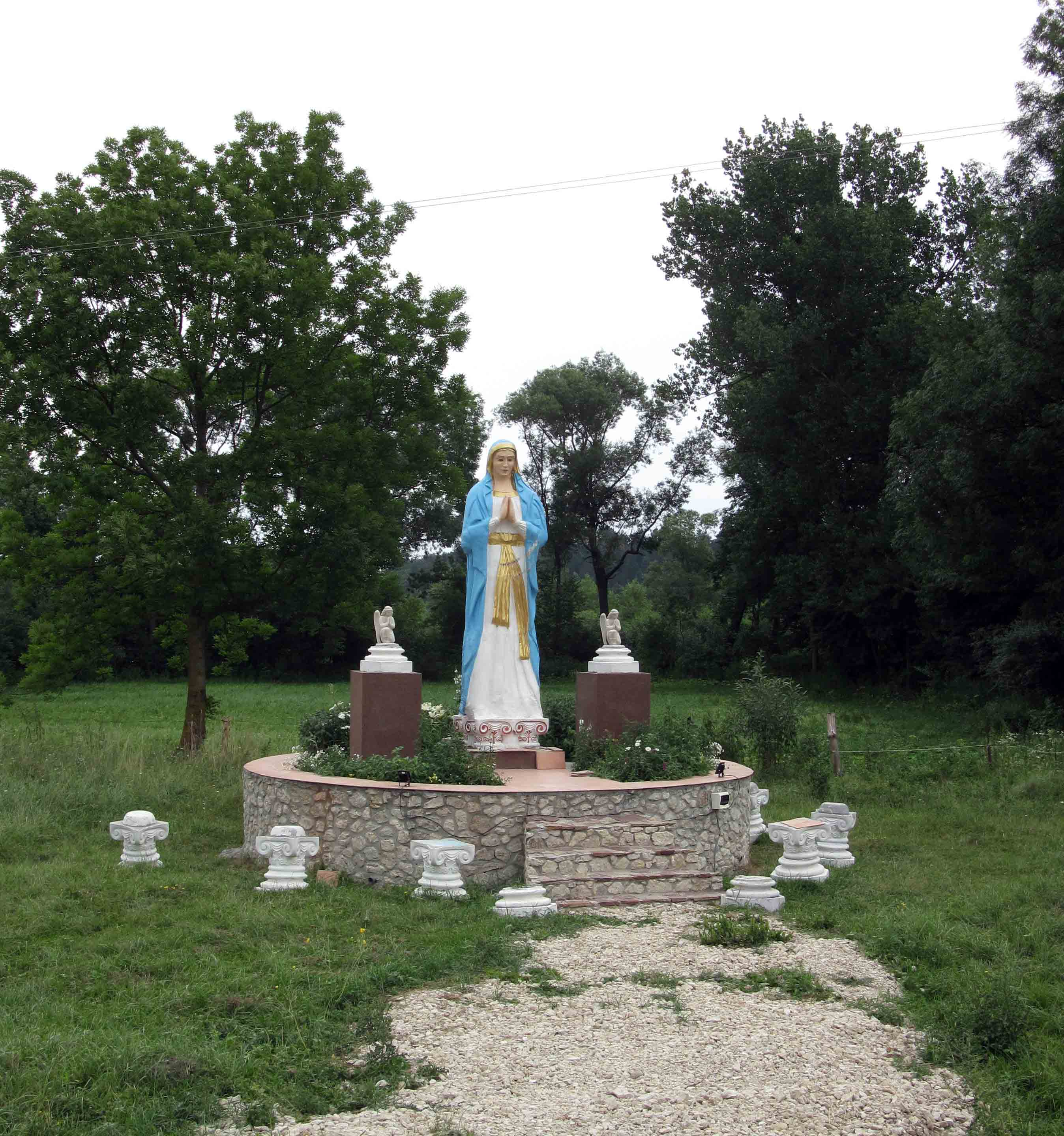 Фігура Матері Божої у Загір’ї Зборівського району Тернопільської області